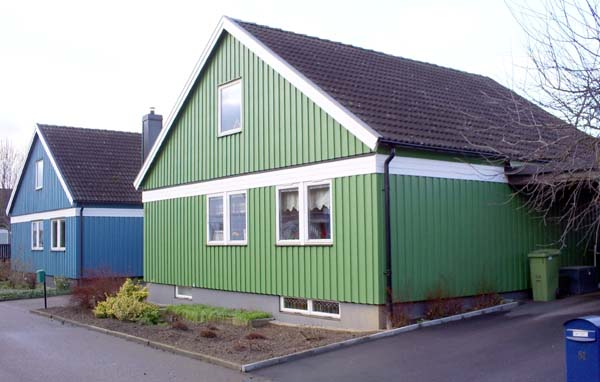 "KB villa"